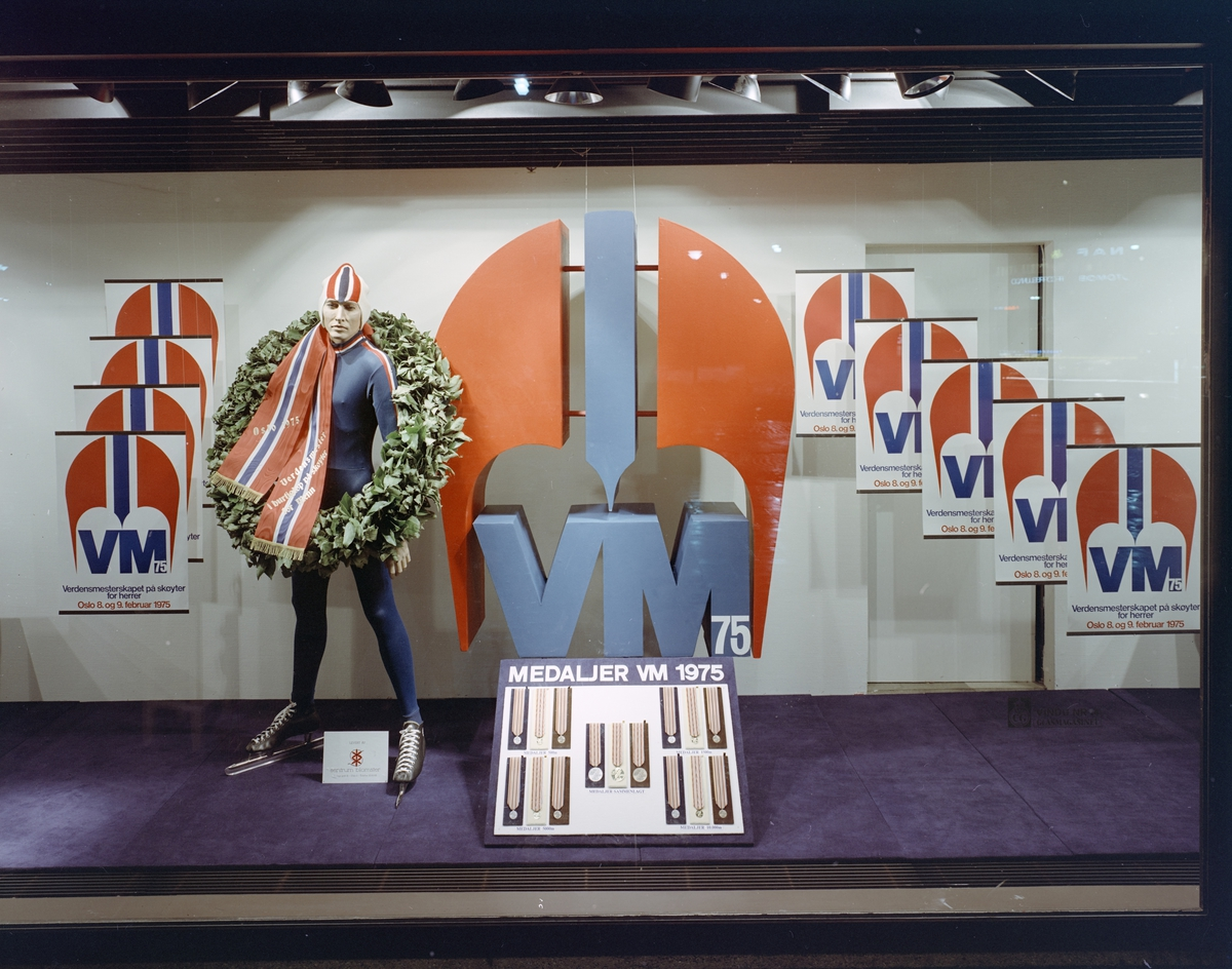 Vindu-utstilling i Glasmagasinet av medaljer og laurbærkrans for Allround-VM på skøyter herrer 1975 på arrangert på Bislett stadion, Oslo.